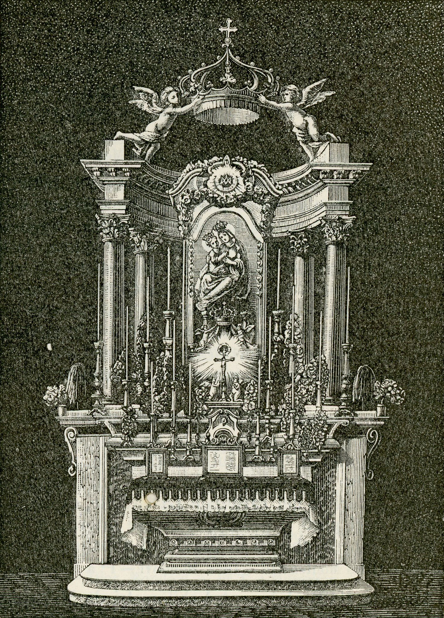 Millesimo: immagine taumaturga nel Santuario della Madonna del Deserto.